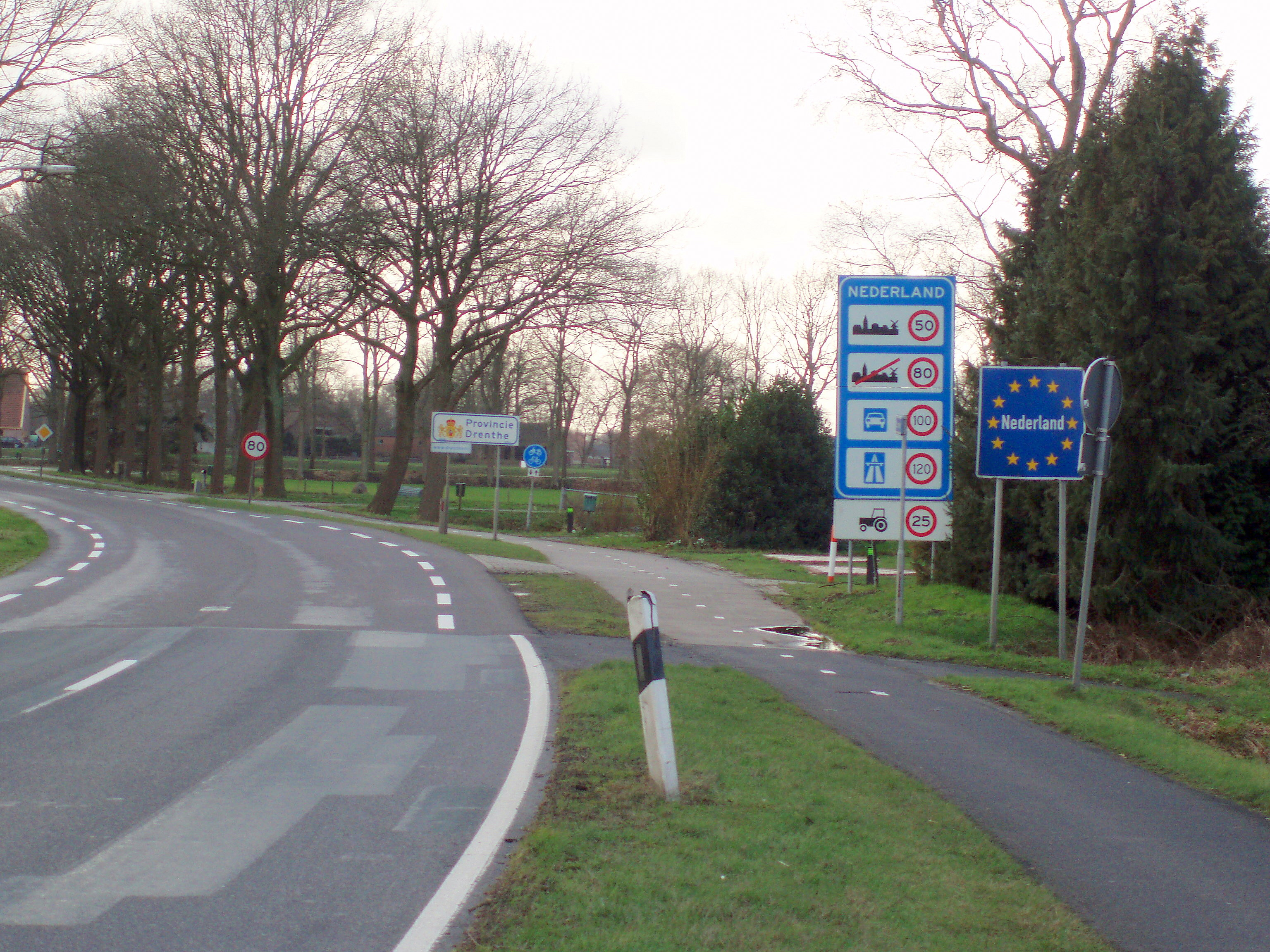 Grensovergang tussen Nieuw-Schoonebeek en Twist. Beginpunt van de N863.